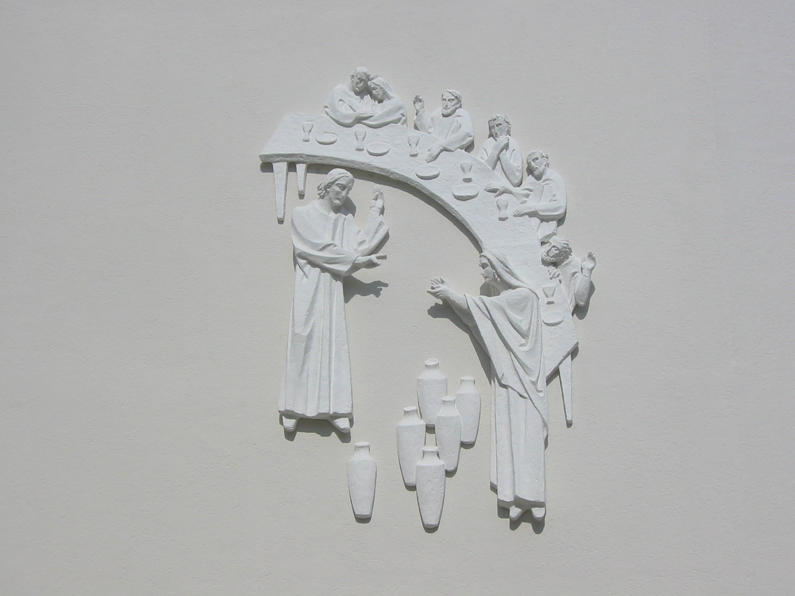 Detailansicht des Reliefs "Die Hochzeit von Kanaan" von Emil Sutor an der Bruder-Klaus-Kirche in Konstanz am Bodensee